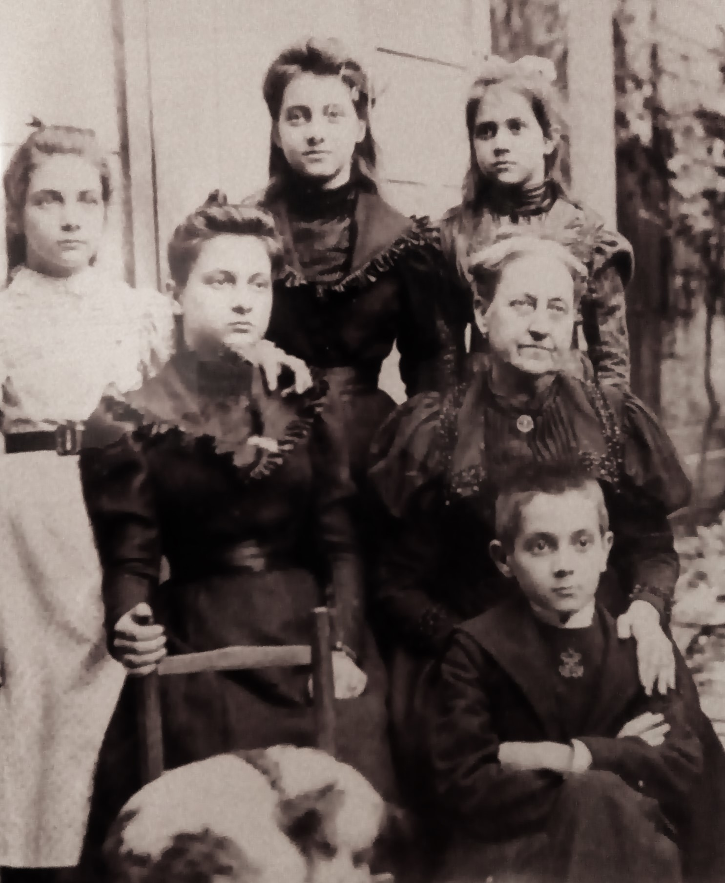 Alexis Léger, sa grand mère, sa mère et ses sœurs ( Musée Saint John Perse )